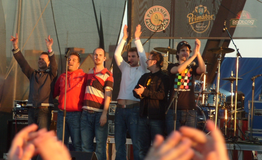 No Name na olomouckém Beerfestu